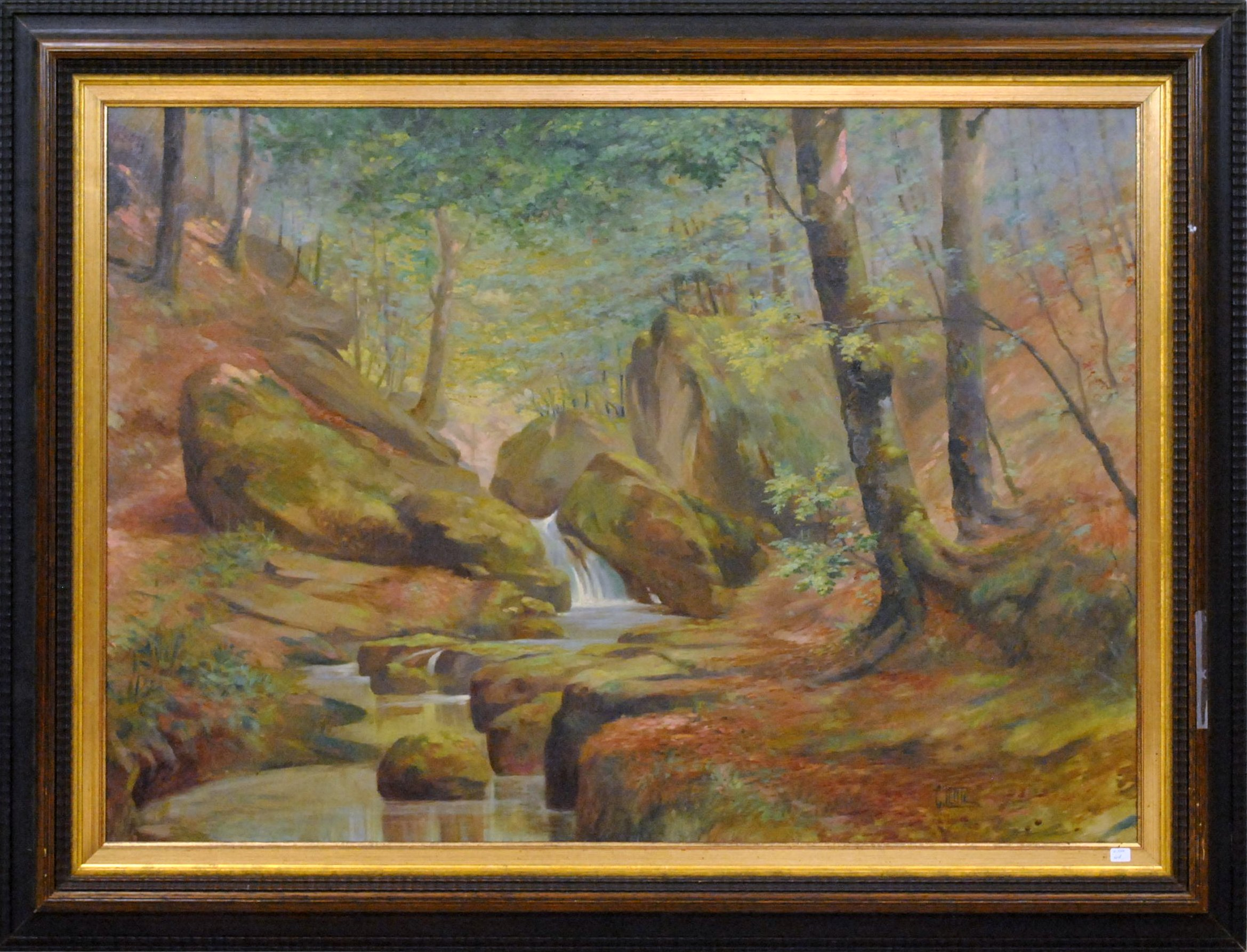 painting: oil